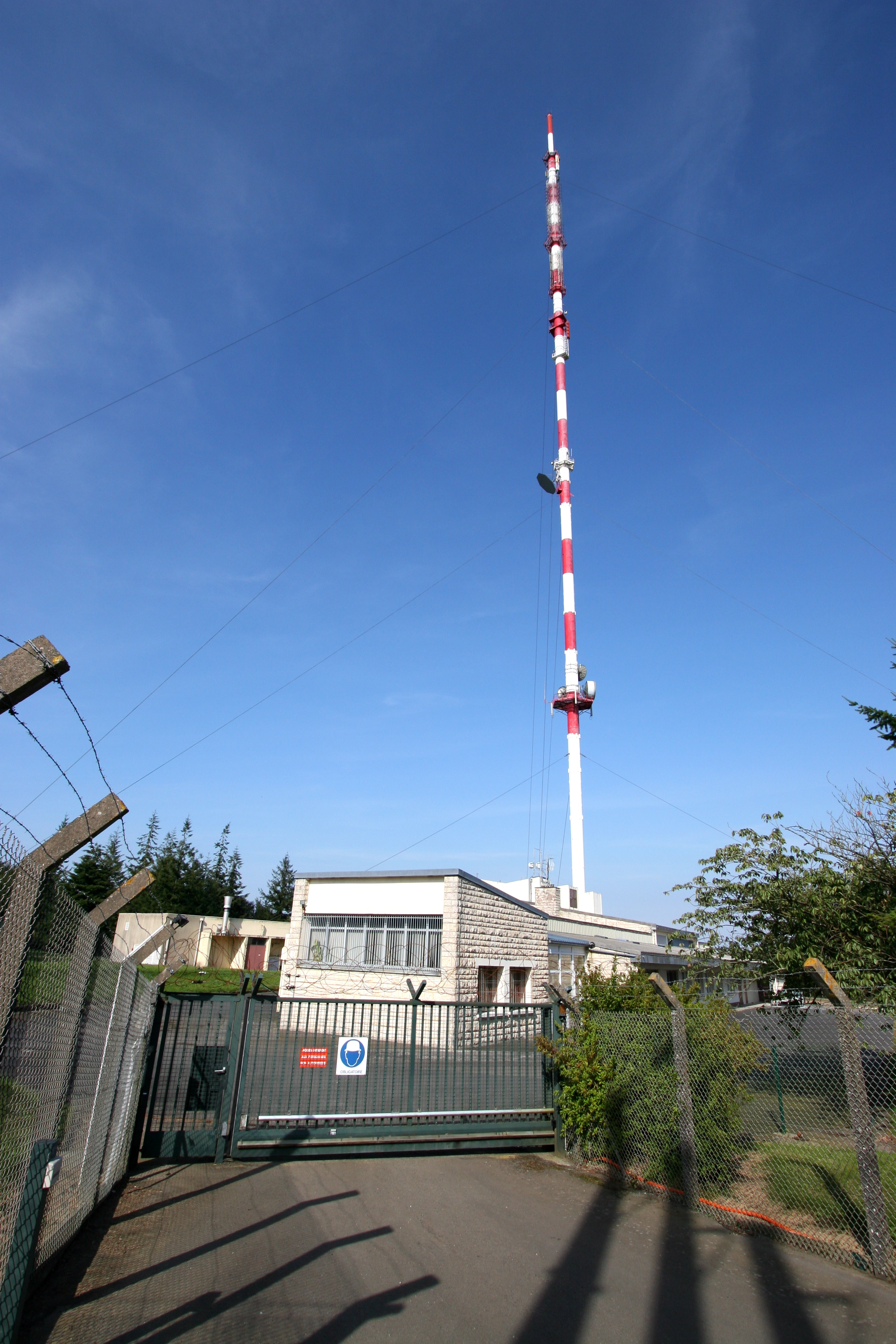 Installation TDF (TéléDiffusion de France) sur le Mont Pinçon, Calvados, France